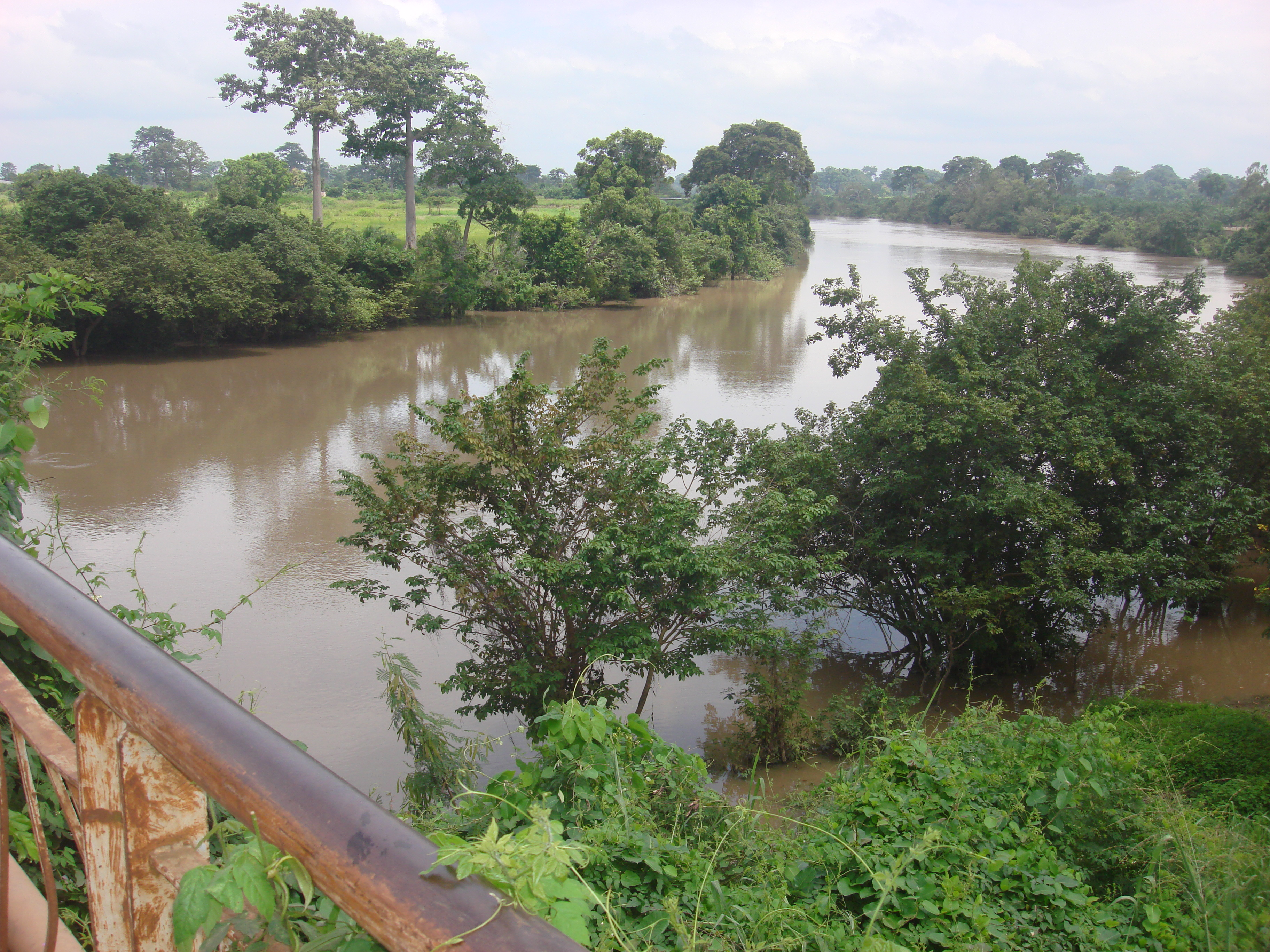 Bandama rouge au niveau de Bouaflé, Côte d'Ivoire